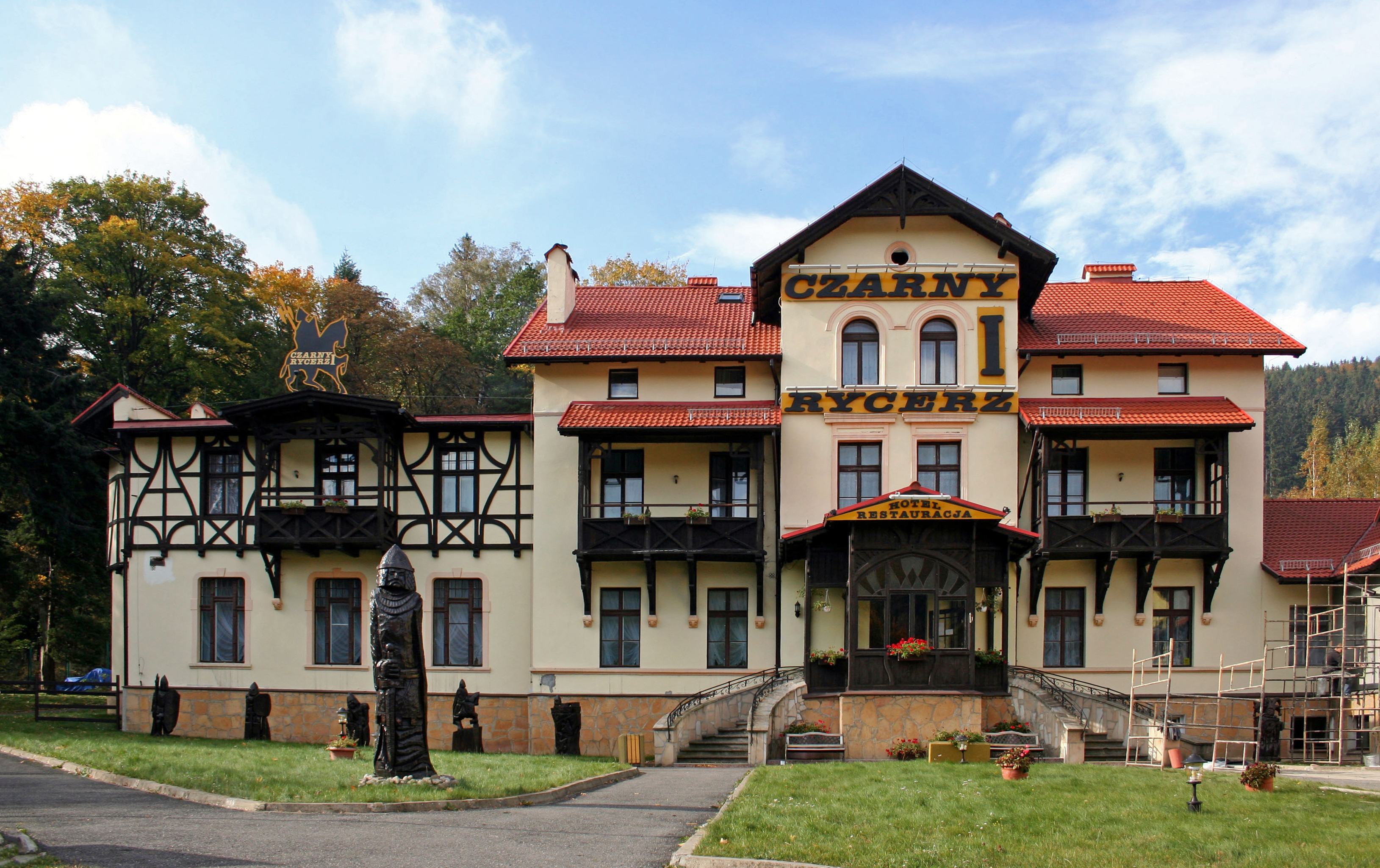 Hotel Czarny Rycerz w Pieszycach Kamionkach